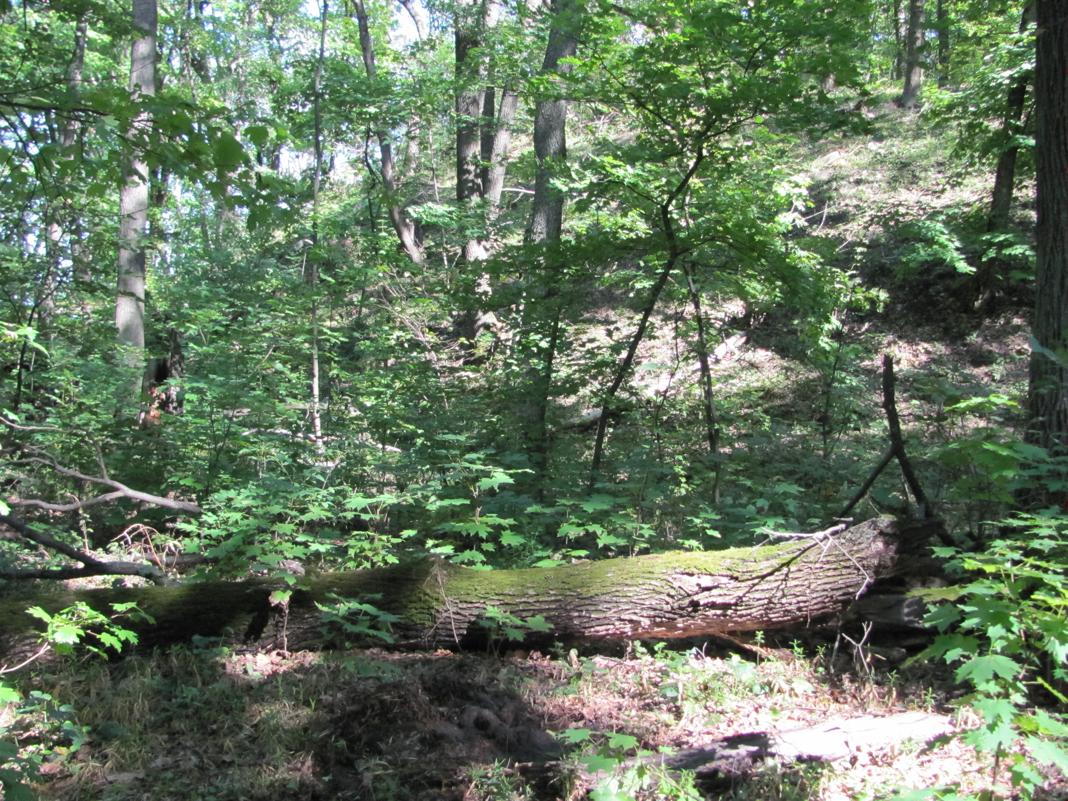 Циркунівська сел. рада